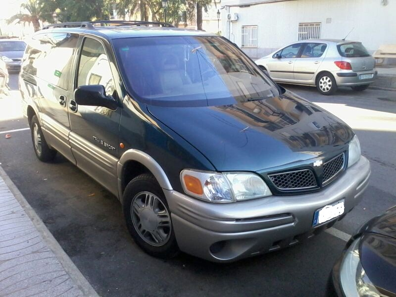 Chevrolet Trans Sport (Europe model).